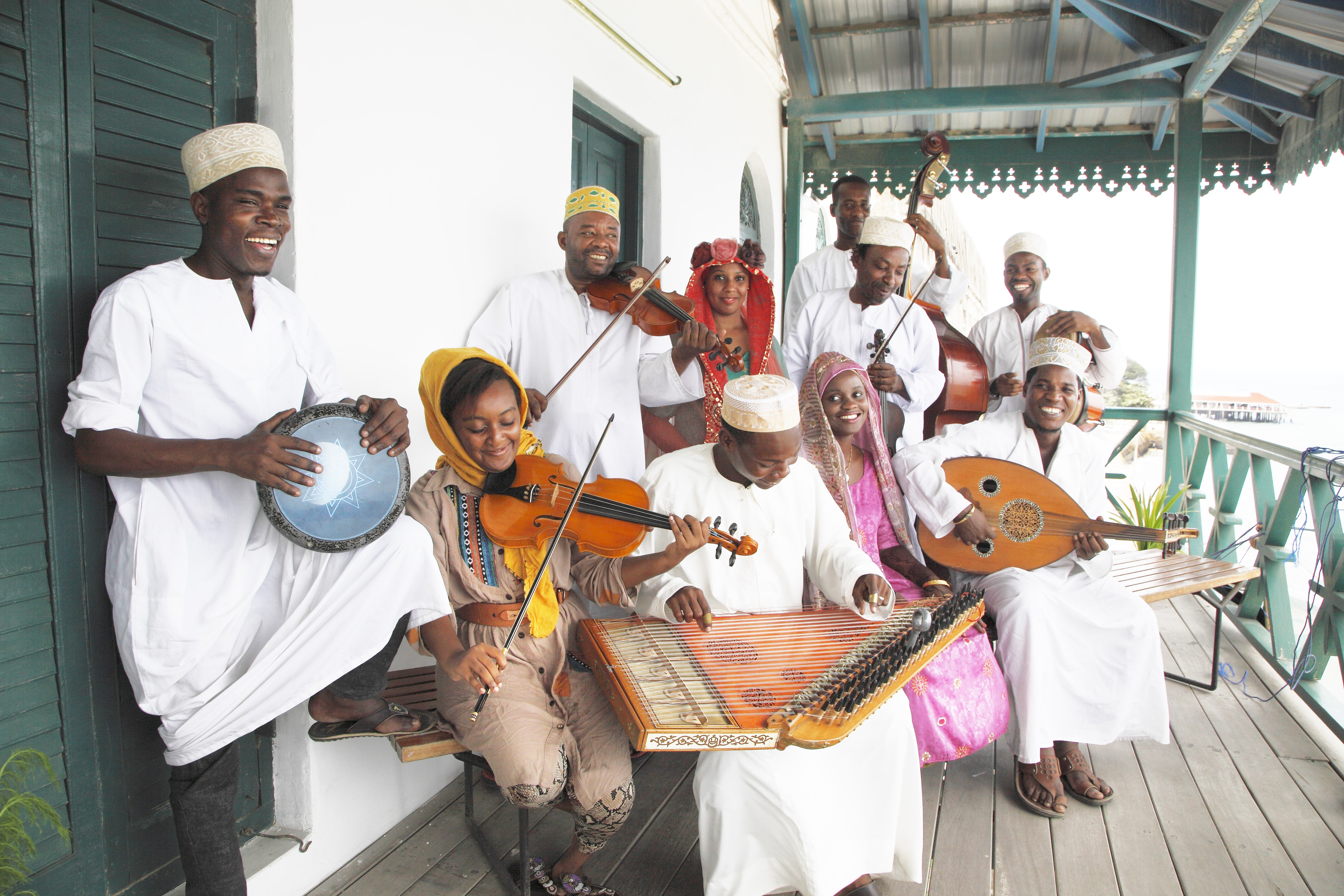 Das Zanzibar Taarab/Kidumbak Ensemble repräsentiert die traditionelle Musik des westlichen Indischen Ozeans, die instrumentalen und vokalen Stile dieser Verschmelzung von arabischer und afrikanischer Musik